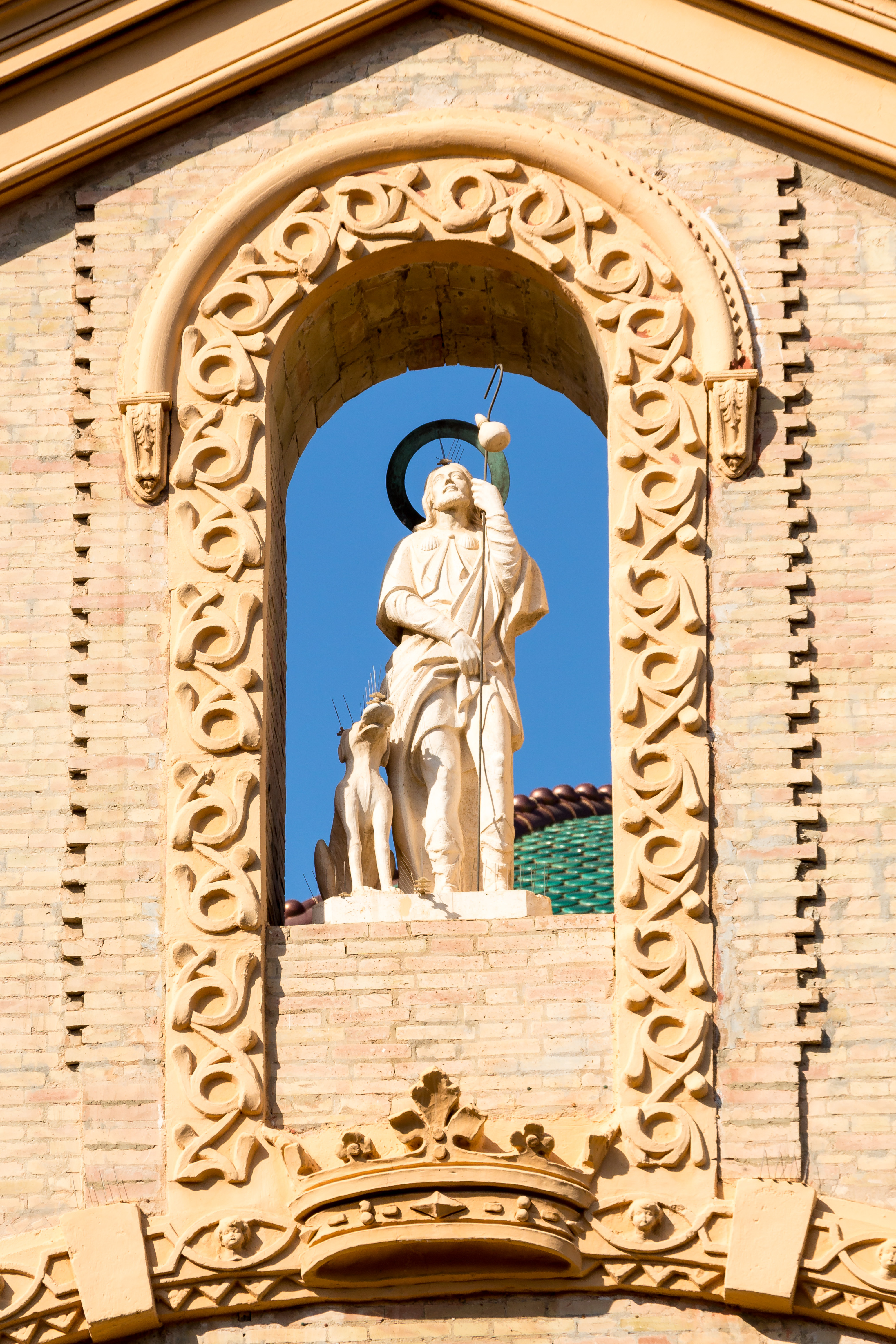 Iglesia parroquial de San Roque de Benicalap 15.250-272.